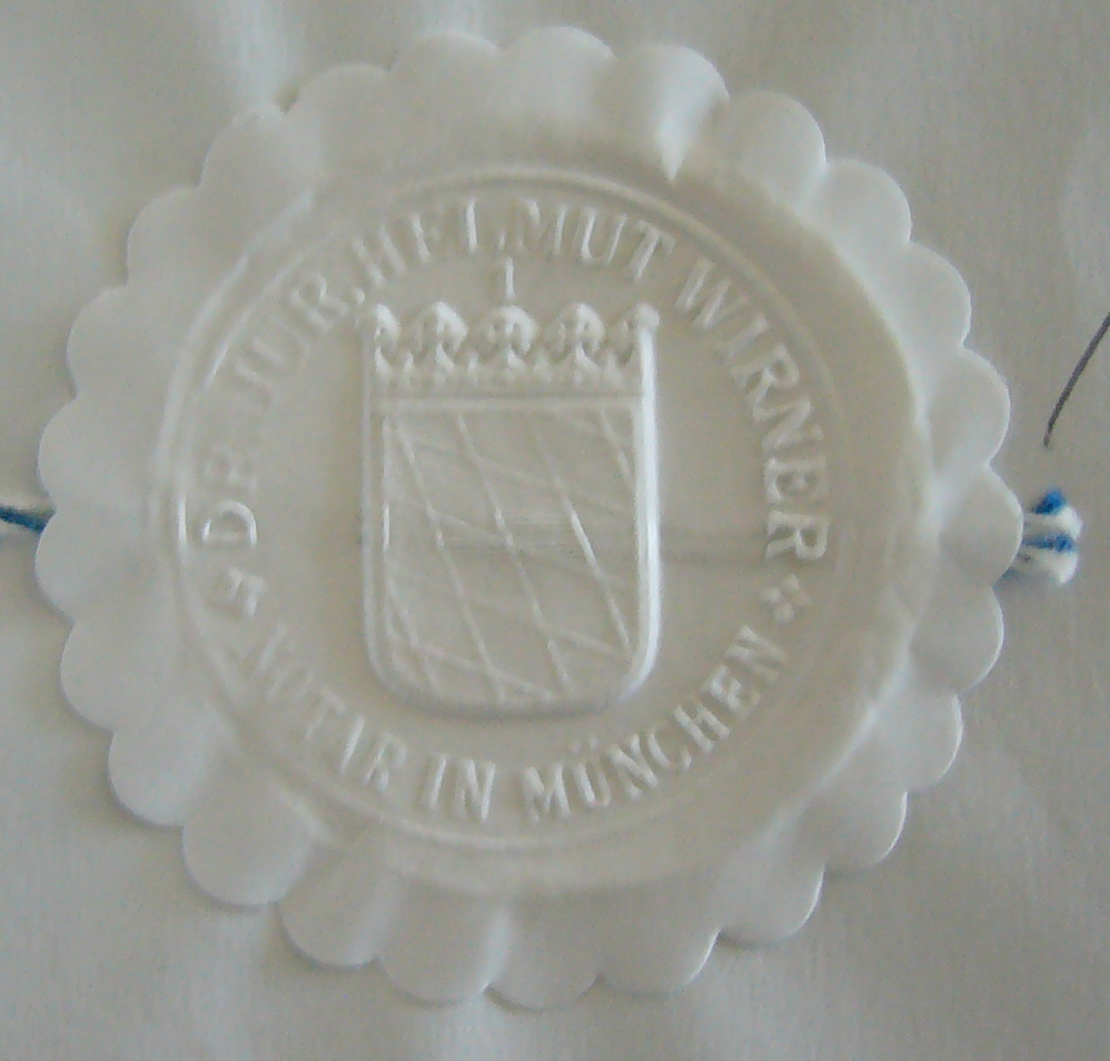 Siegelmarke in Ausführung als Prägesiegel eines bayerischen Notars auf einer Urkunde vom 15. Februar 2001, in der Umschrift oben der Name des Notars, unten „NOTAR IN MÜNCHEN“, und mit dem kleinen bayerischen Staatswappen als Siegelbild. § 3 der Verordnung zur Ausführung des Gesetzes über das Wappen des Freistaates Bayern (AVWpG) bestimmt „Das kleine Staatswappen führen außerdem: 1. […] 2. Die Notare Die Umschrift im Dienstsiegel enthält im unteren Halbbogen den Namen des Notars und die Wörter ‚Notar in …‘ (Ort).“ […]